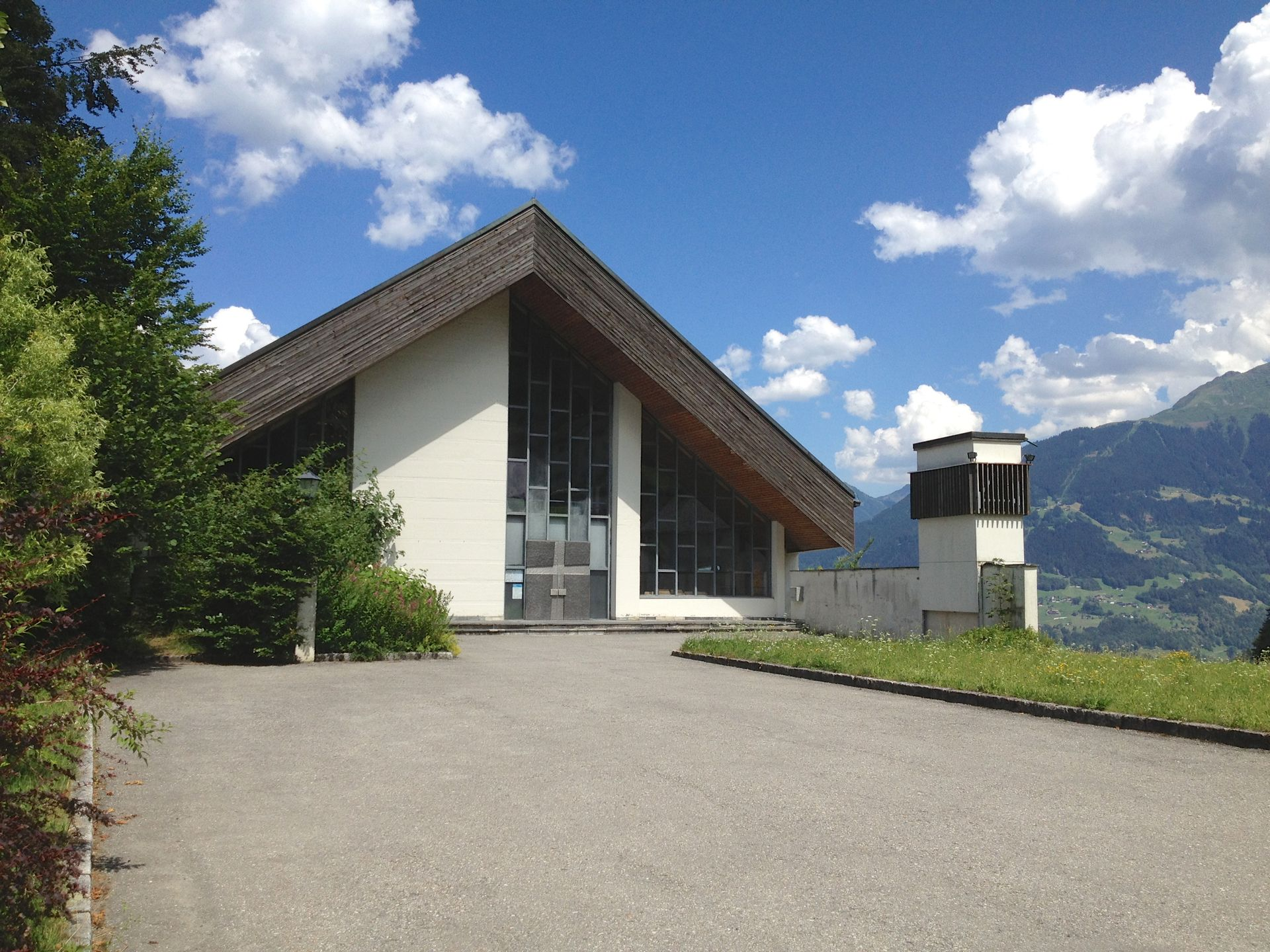 Kath. Filialkirche Verklärung Jesu